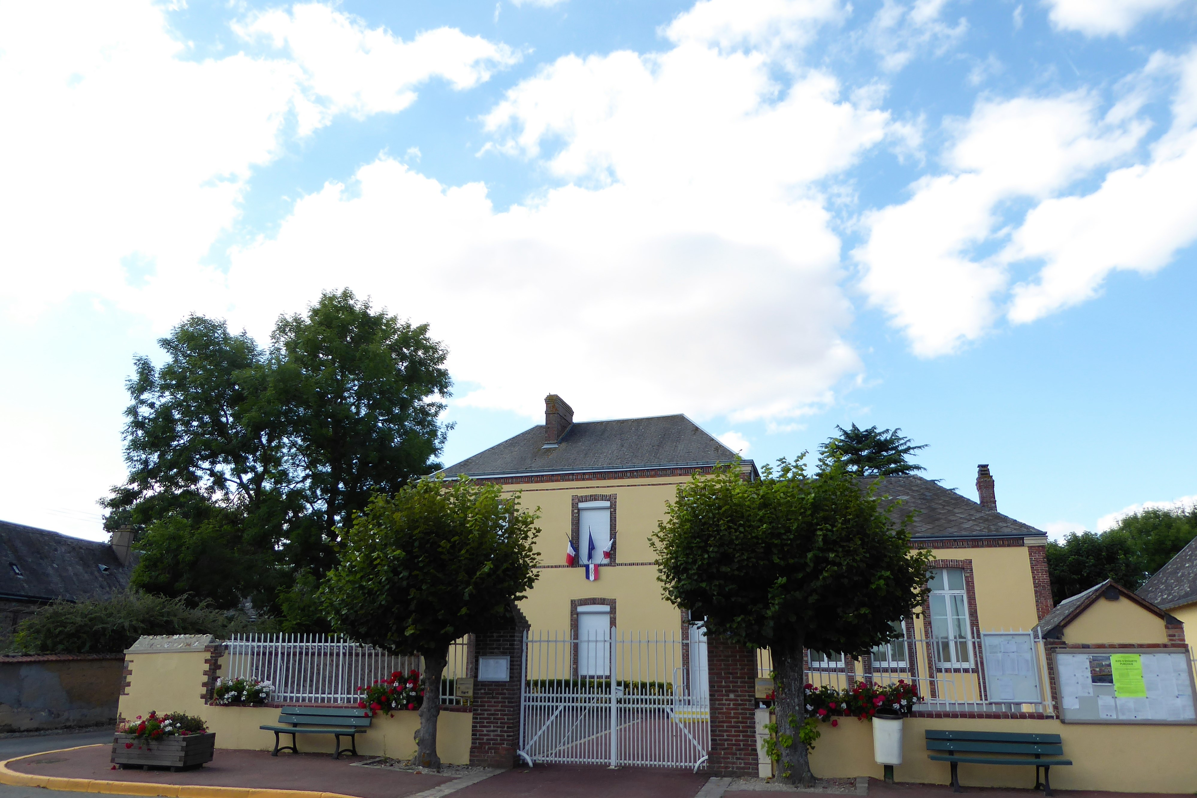 mairie, Marchéville, Eure-et-Loir (France).